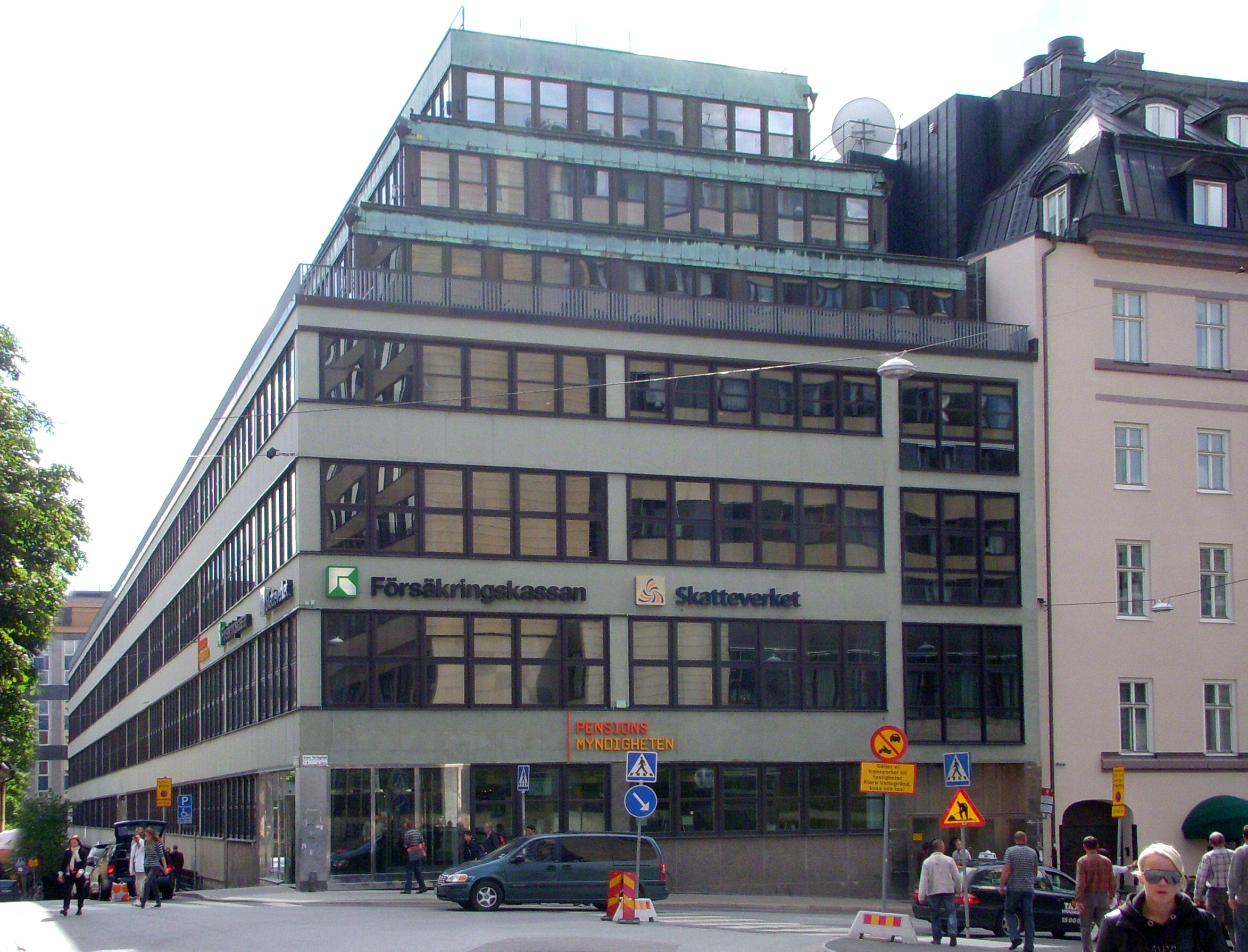 Esselte-huset i Stockholm, sidan mot Klara västra kyrkogatan